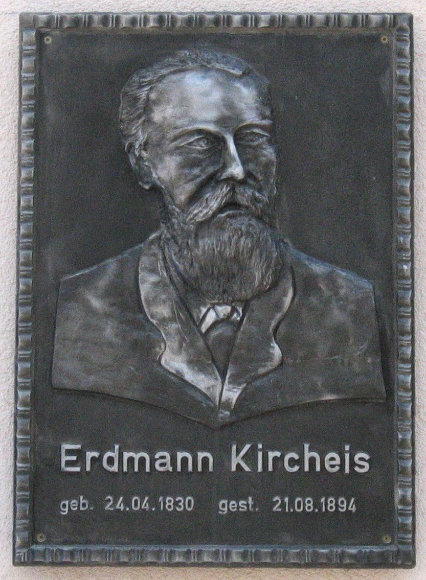 Porträt des Unternehmers „Carl Erdmann Kircheis“ Aue